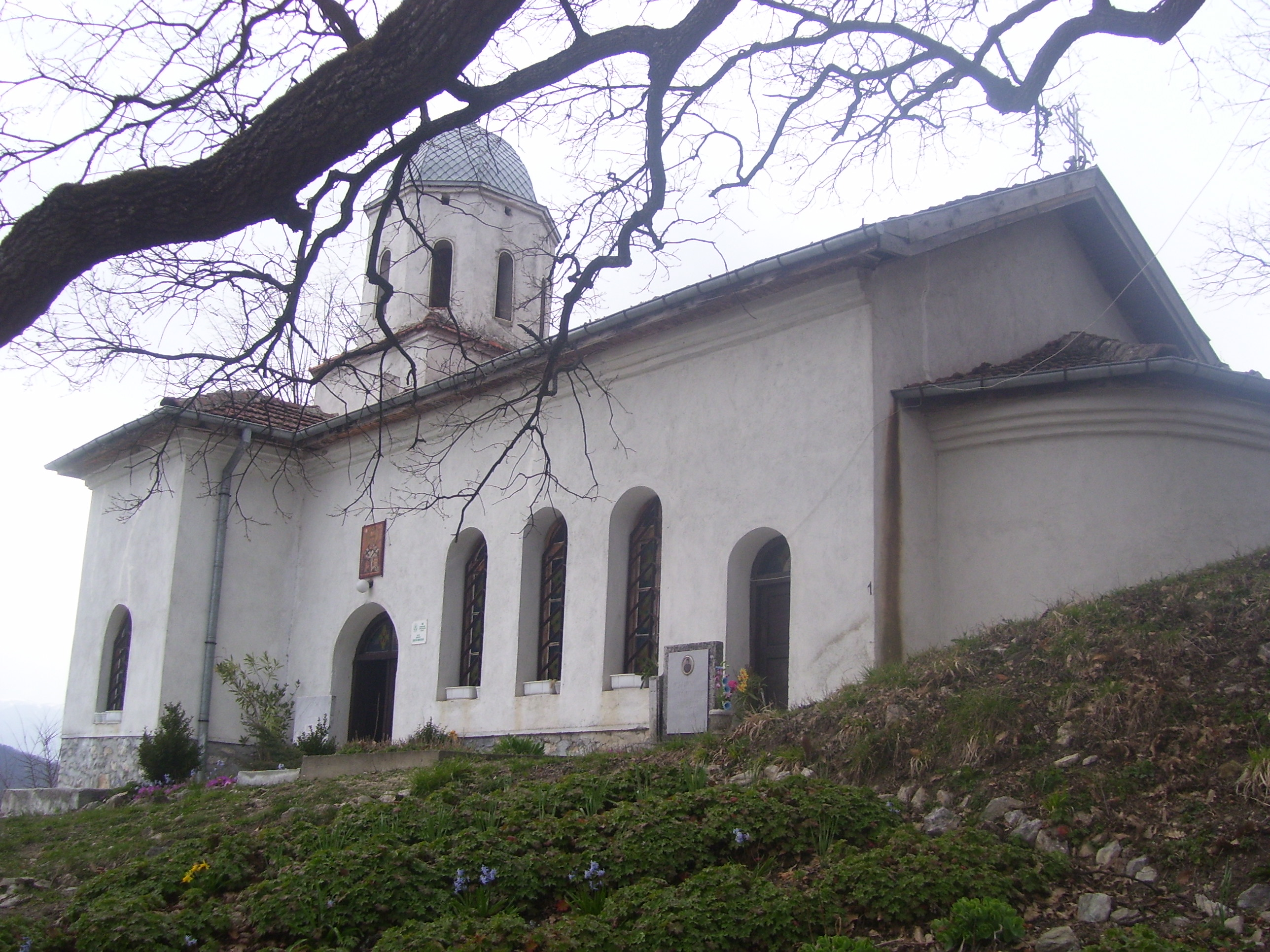 Църквата "Свети Николай" в Скравенския манастир